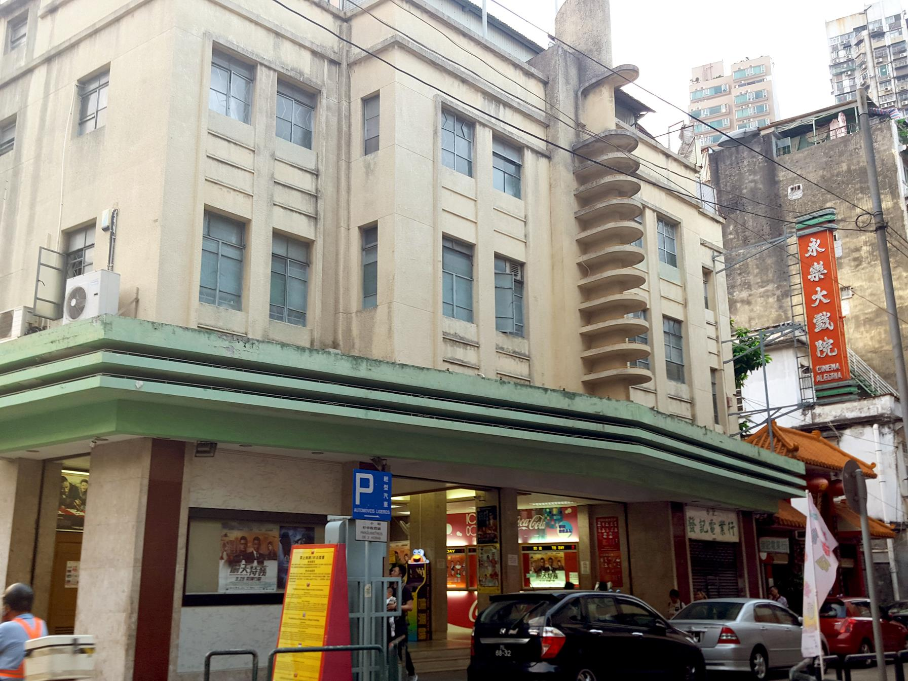 Cinema Alegria